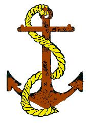 Een symbool dat in de heraldiek en in de scheepvaart wordt gebruikt. De Nederlandse Koninklijke Marine gebruikt een gekroond onttakeld anker als symbool. Robert Prummel 11 aug 2006 18:45 (CEST)